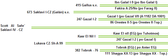 Rodokmen